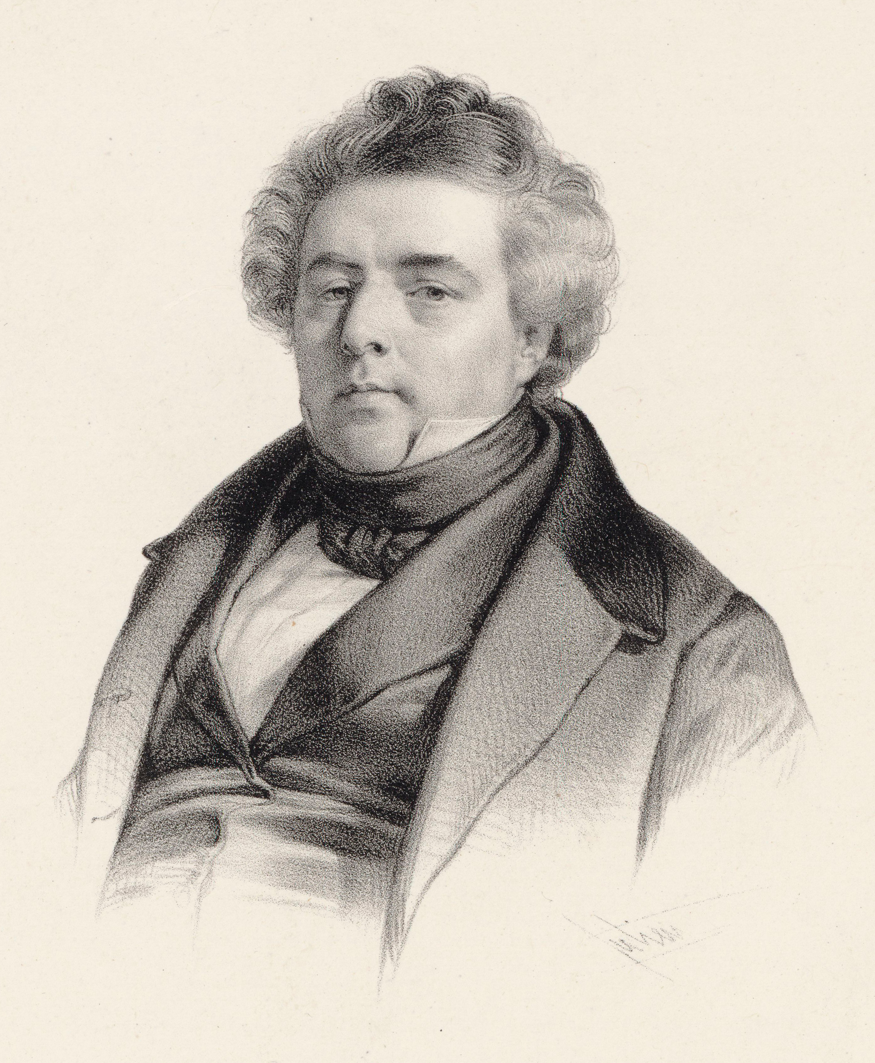 Luigi Lablache, dans la Galerie de la presse, de la littérature et des beaux-arts